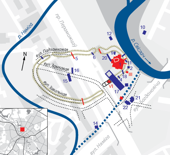 Чырвоным - месцы і нумерацыя археалагічных раскопаў пав. Э.М. Загарульскага. Фіялетавым - месцы і нумерацыя археалагічных раскопаў пав. Г.В. Штыхава. 1 - зводны раскоп 1946-1961 гг.; 15 - раскоп 1981-1982 гг.; 17 - раскоп у катлаване станцыі метро "Няміга" 1984-1986 гг.; 20 -раскоп 1986 г.; 21 - раскоп 1987 г.; 22 - раскоп 1988 г. (пав. Г.В. Штыхава). Пункцірам - схемы дарог на мапах Мінска XIX ст. Чорны прамавугольнік - месца размяшчэння крапасных варот.